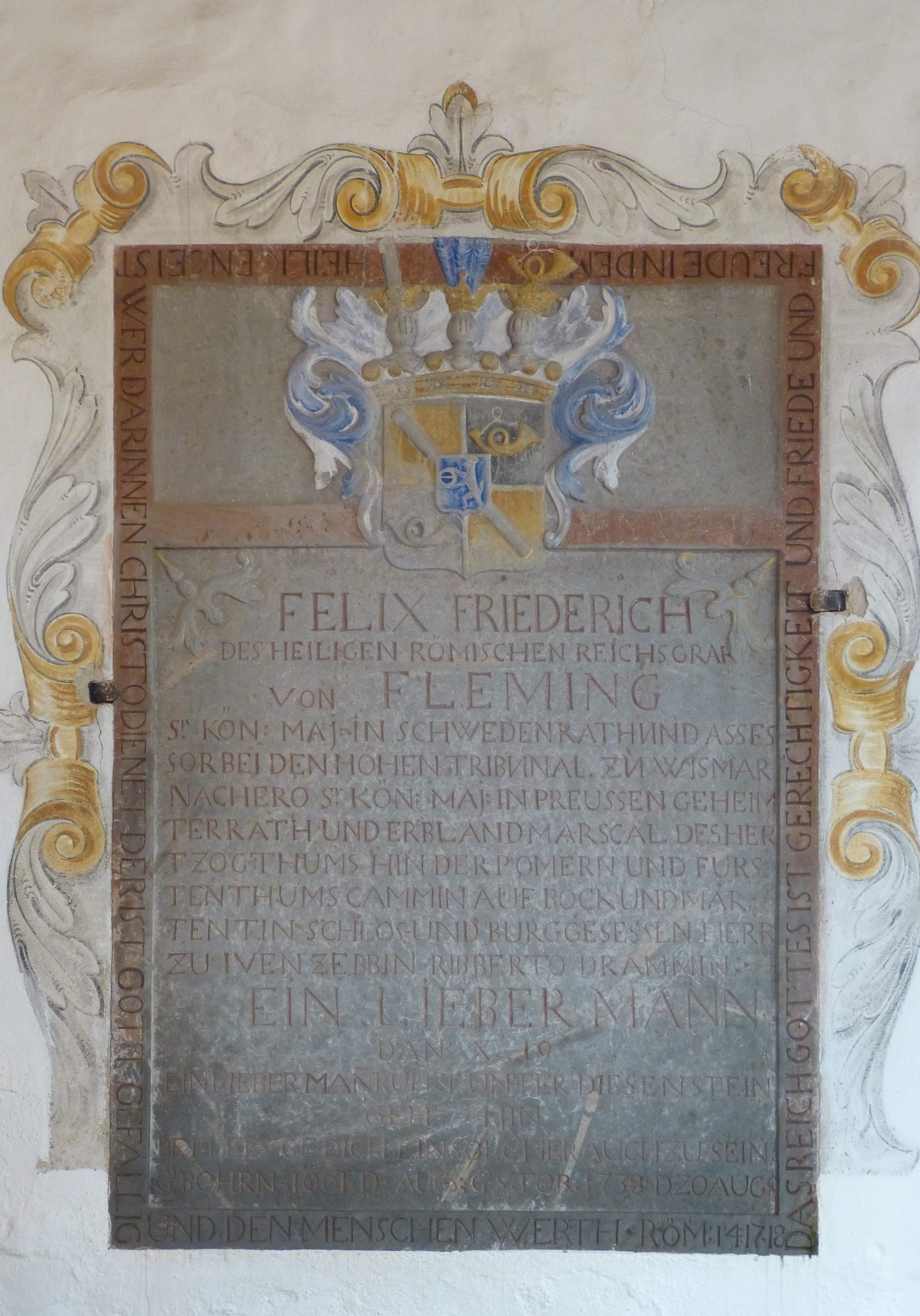 Kirche in Iven, in die Nordwand gesetzte Grabplatte des Felix Friedrich von Flemming